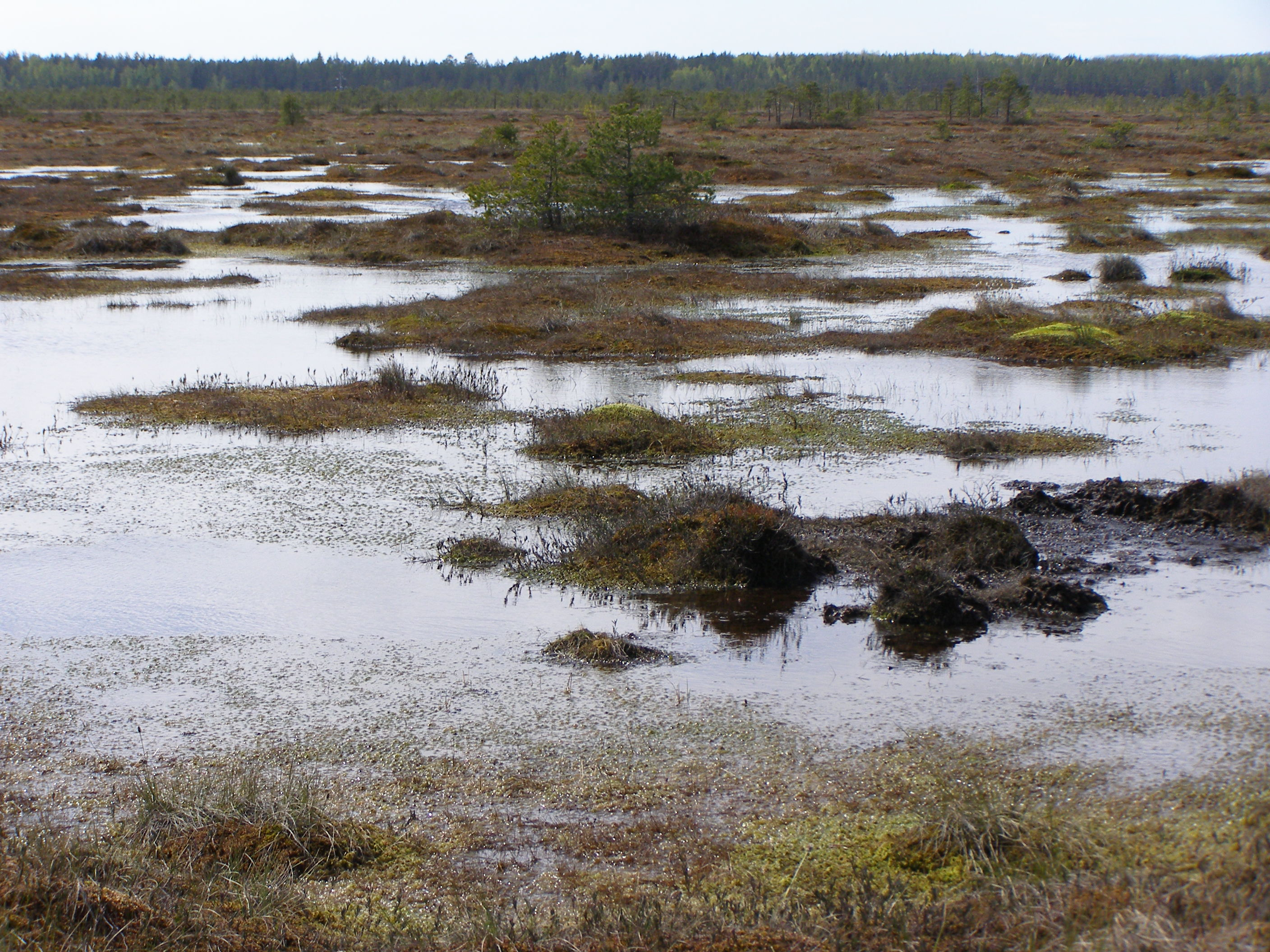 Sirtsi soo